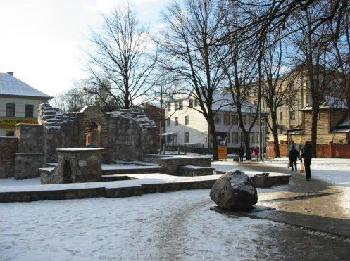 Rīgas Horala sinagoga